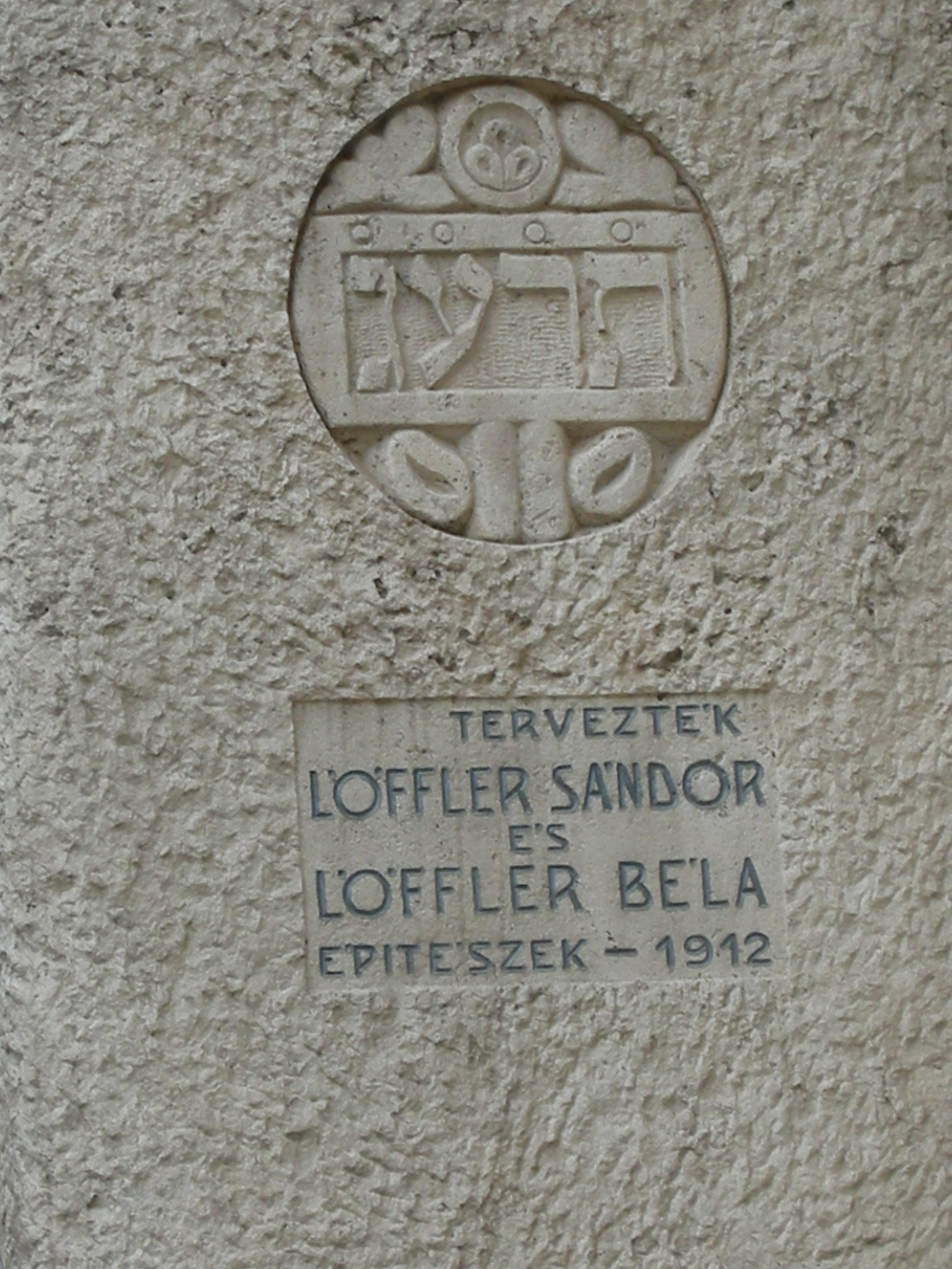 Budapest